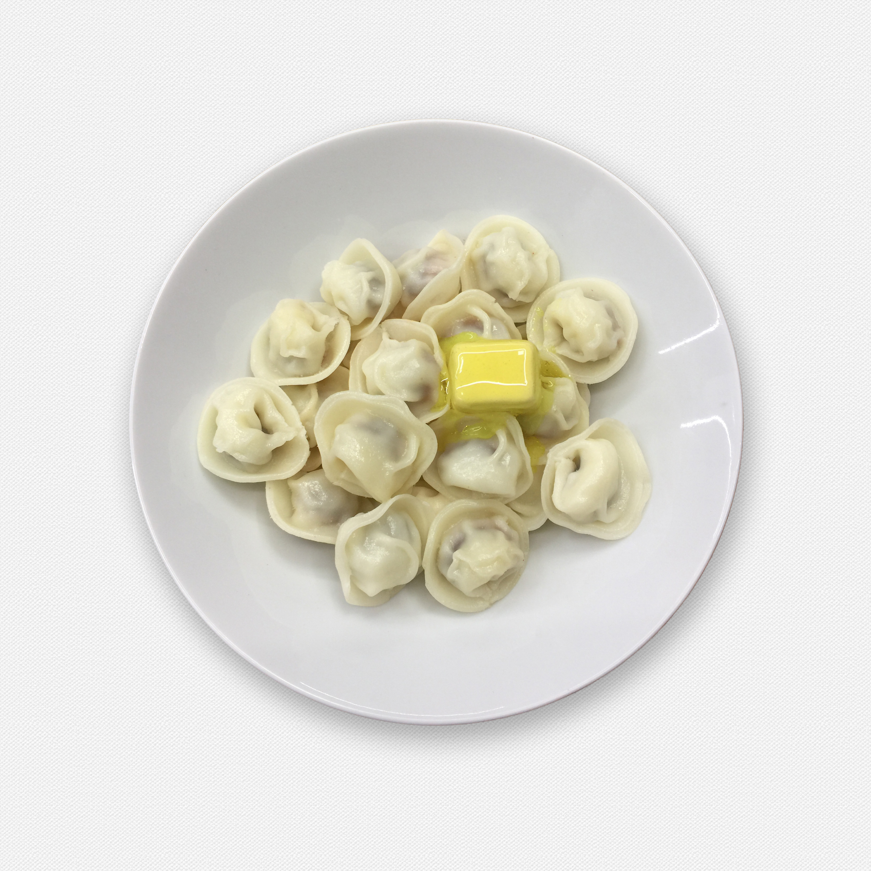 Муляж пельменей на тарелке.